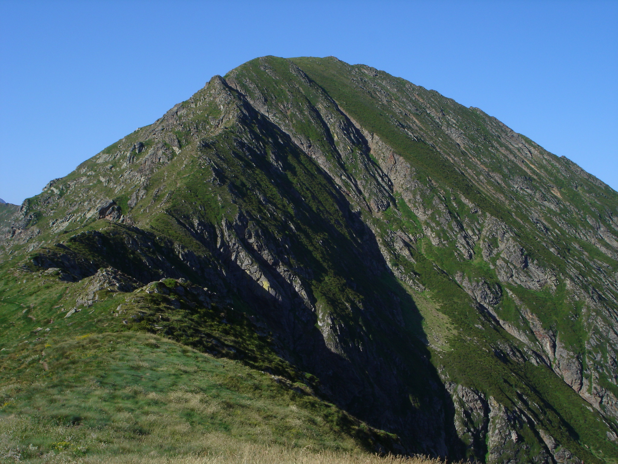 La face Nord de la Pique d'Endron, en été. Ariège, France.